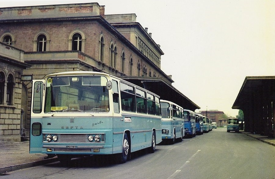 Autobus Fiat 306 carrozzato Barbi con la livrea della Società Emiliana di Ferrovie, Tranvie ed Automobili (1970)